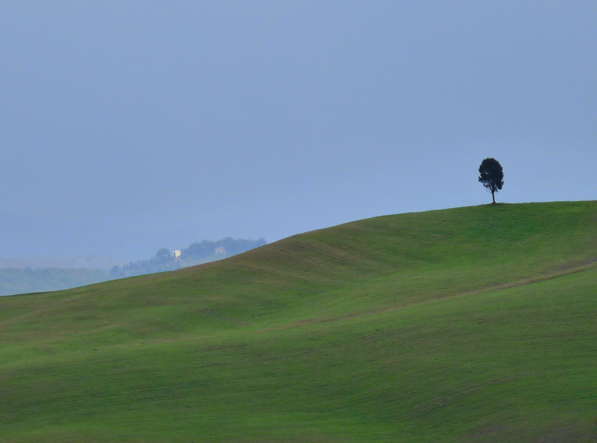 La Toscana